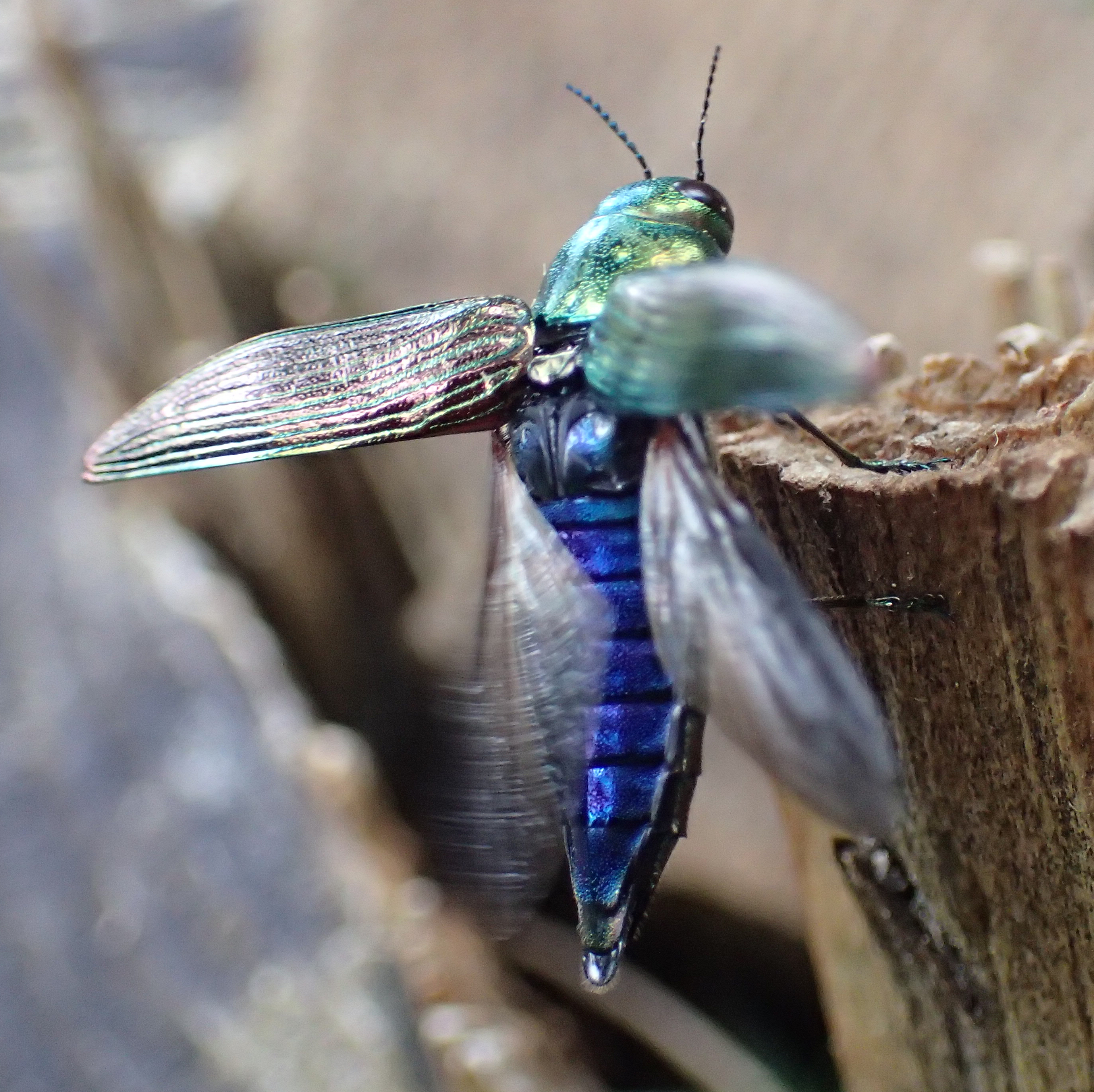 Eurythyrea austriaca von Griechenland, Peloponnes, zwischen Christovitsi und Elati